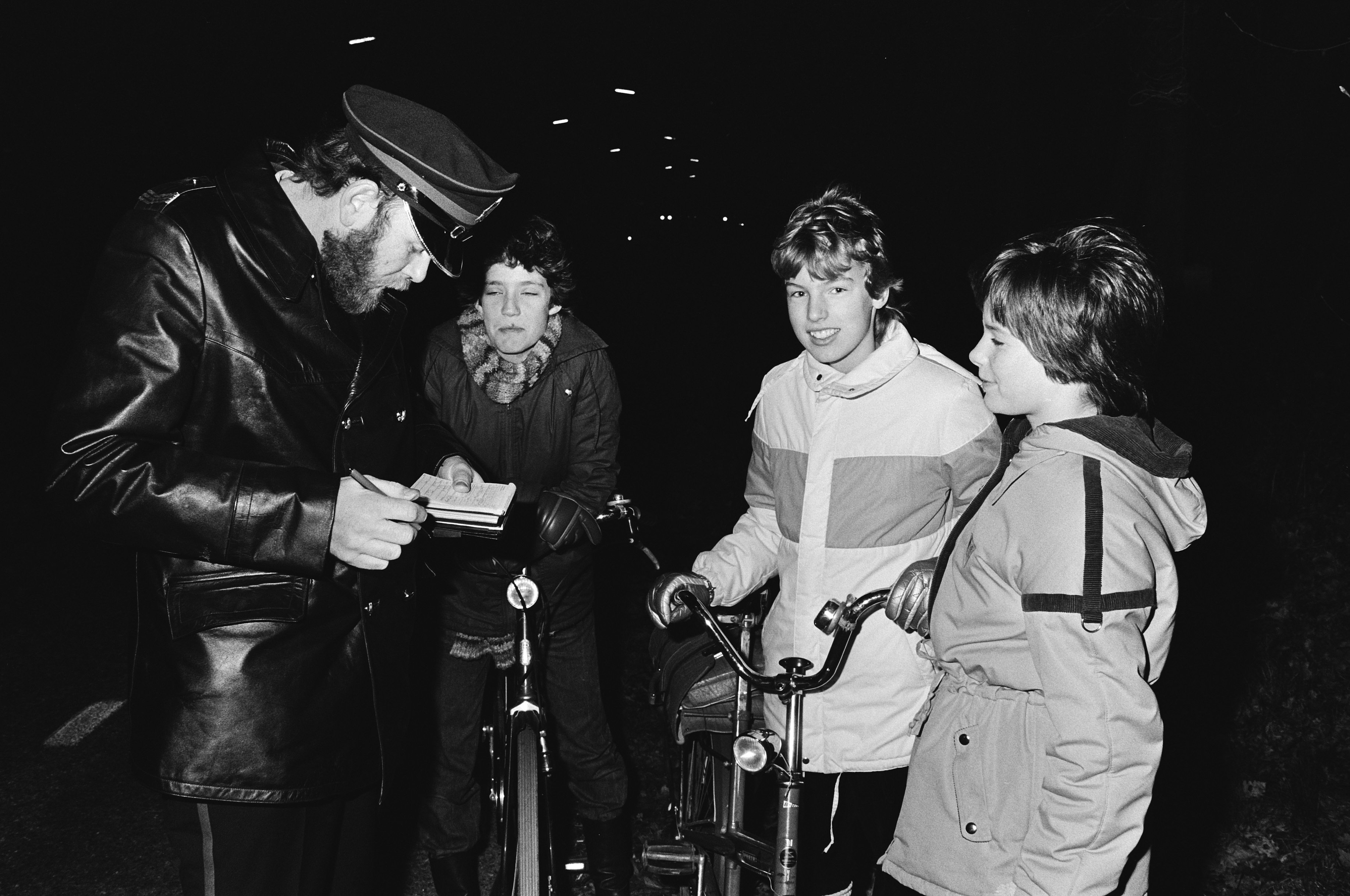 Collectie / Archief : Fotocollectie Anefo Reportage / Serie : Verkeerscontrole van scholieren in Amersfoort Beschrijving : Agent schrijft een bekeuring uit Datum : 13 januari 1983 Locatie : Amersfoort (prov) Trefwoorden : jongeren, politie, verkeersovertredingen Fotograaf : Antonisse, Marcel / Anefo Auteursrechthebbende : Nationaal Archief Materiaalsoort : Negatief (zwart/wit) Nummer archiefinventaris : bekijk toegang 2.24.01.05 Bestanddeelnummer : 932-4619